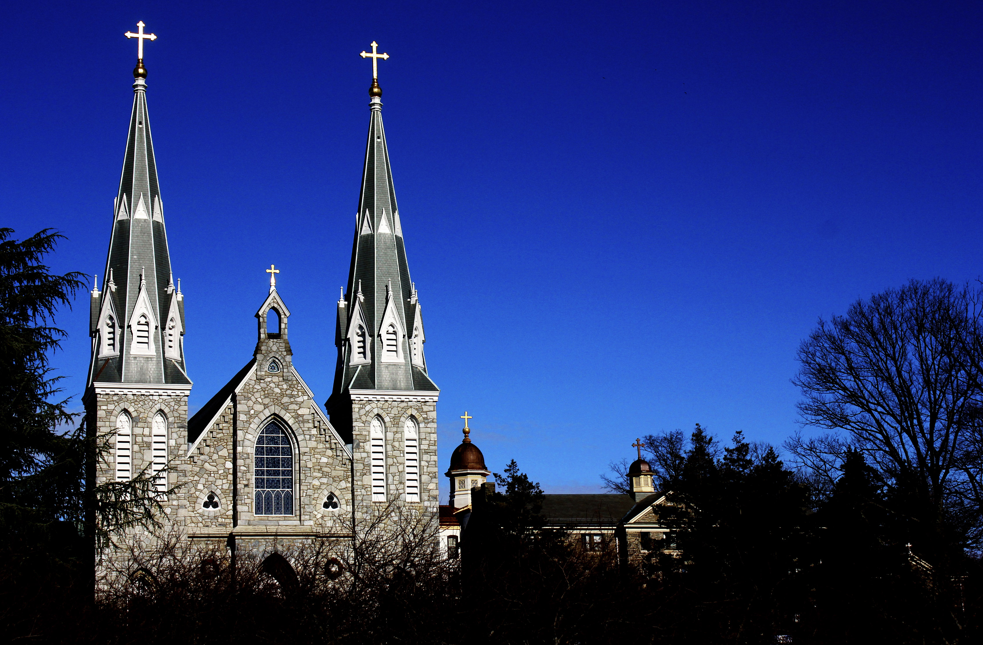 Kyrkan som står på Villanova Universitets område.